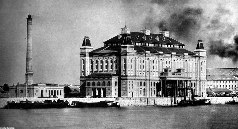 Elevátor a Duna felől